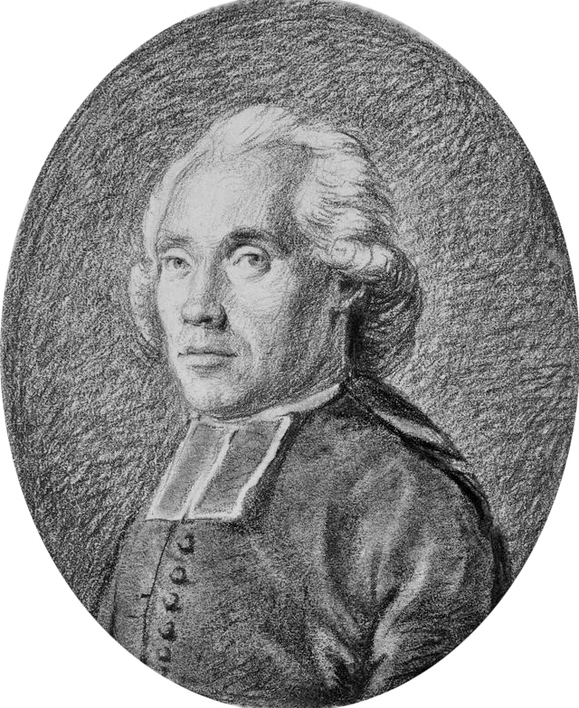 Pierre-Mathieu Joubert dit aussi Pierre Marie Joubert, (1748-1815), curé de Saint-Martin d'Angoulême - député du clergé d'Angoumois